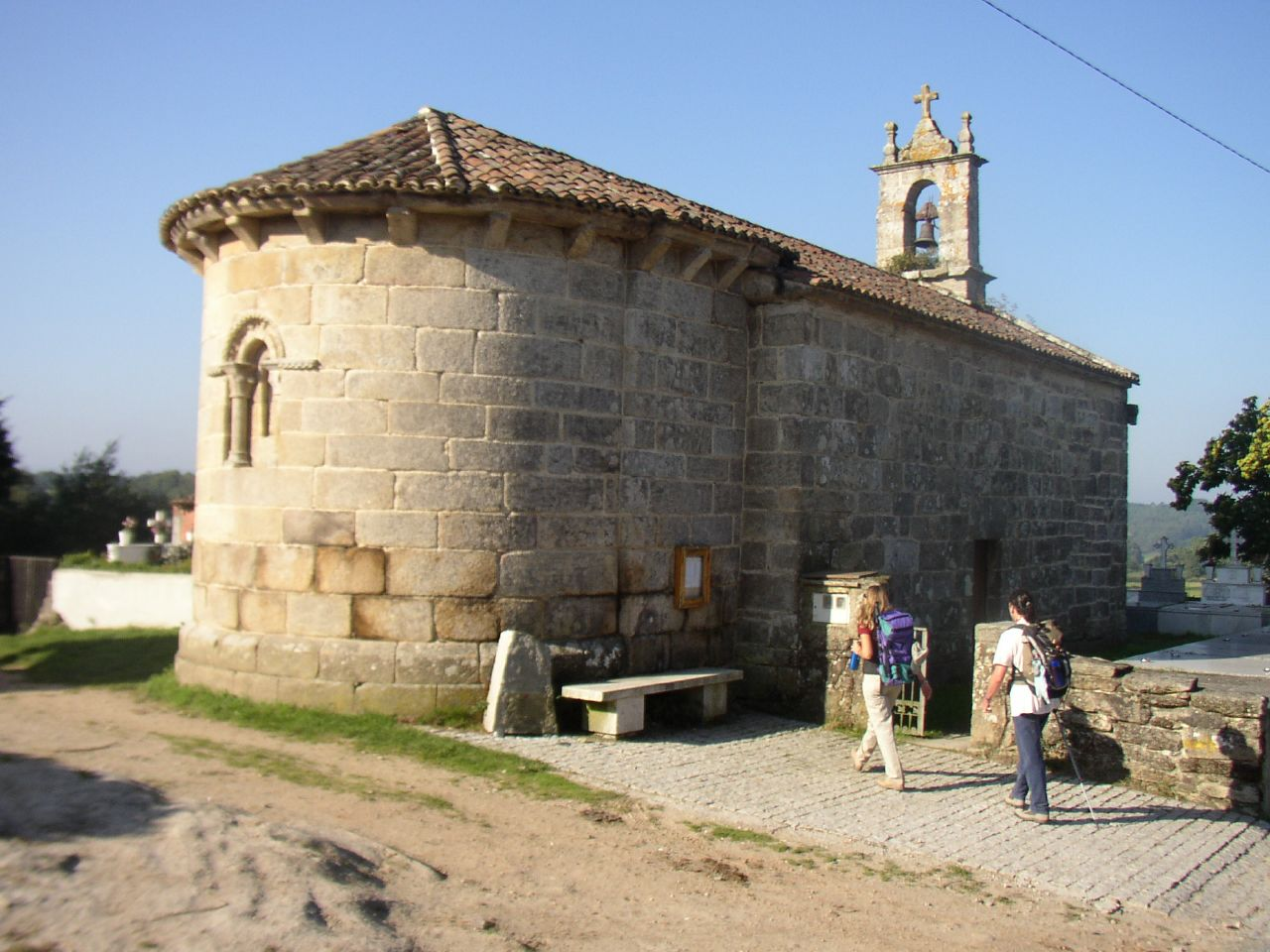 La iglesia de San Xulián do Camiño (Palas de Rei, Lugo, España) es una construcción románica del siglo XII.